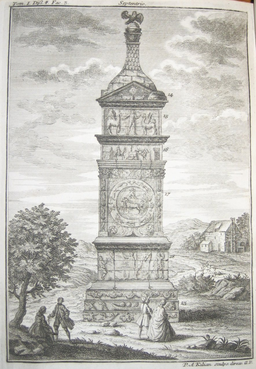 Sujet: Gravure vun der Igeler Sail vum P. A. Kilian aus dem 1. Band vum Jean Bertholet senger Histoire ecclésiastique et civile du Duché de Luxembourg et Comté de Chiny (1741). Auteur: selwer opgeholl vum user:Zinneke Lizenz: Domaine public